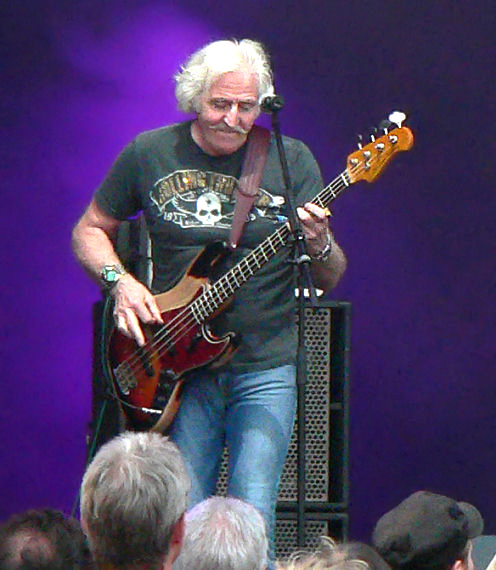 Leo Lyons